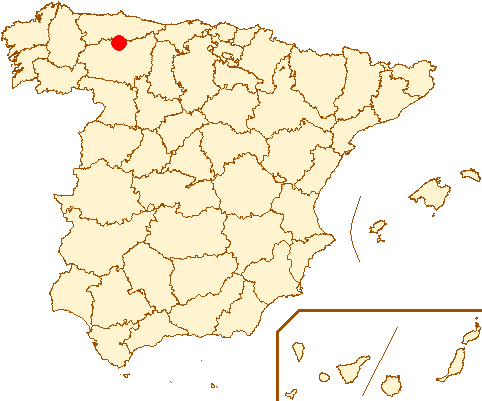 Situación del Túnel del Negrón, en España.